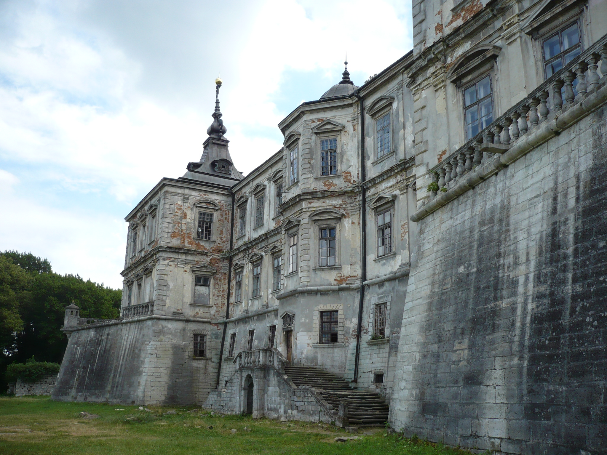 Pałac w Podhorcach, tył, 2012 r.